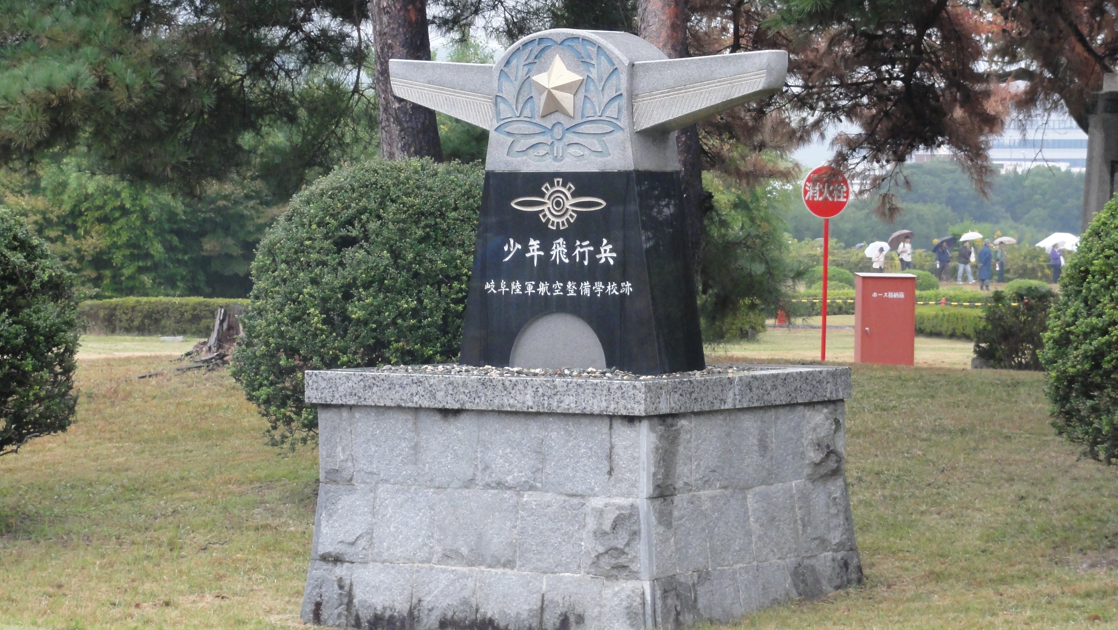 2012年10月28日、航空自衛隊岐阜基地にて